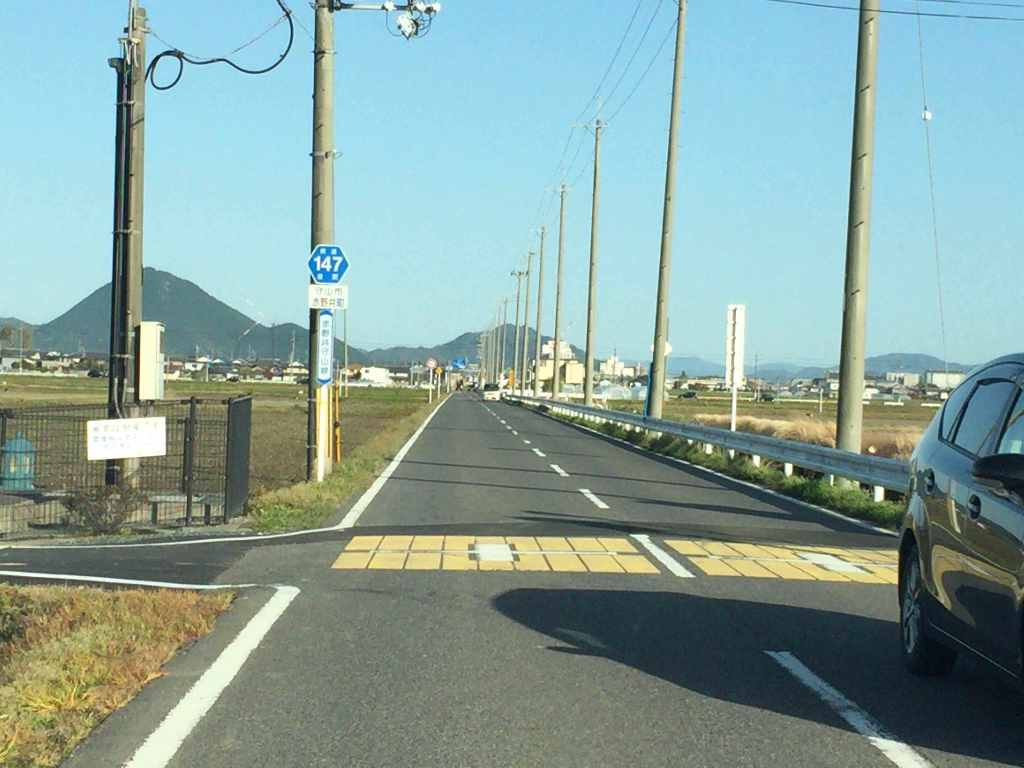 滋賀県道147号赤野井守山線、守山市赤野井町（あかのいちょう）